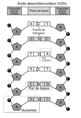 Nucleótido También llamado monómero está constituido por tres partes fundamentales tales como: 1 Una base Nitrogenada: se clasifican en dos grupos, Purinas y Pirimidinas. 2 Un azucar: Son pentosas (Formados por 5 carbonos) aparecen en los ácidos nucleicos que son de dos clase, Ribosoma (Presente en el ARN), Desoxirribosa(Presente en el ADN). 3 Un grupo fosfato: es el agente encargado de enlazar los nucleótidos, este grupo se alterna en los azúcares, formando una especie de columna.